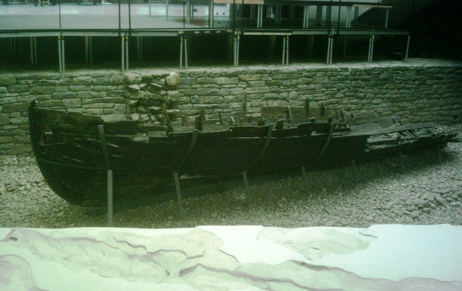 Chaloupe (ou bateau plat) datant du régime français (1700-1760) trouvée lors de fouilles archéologiques à Québec, sous la maison Estèbe. Cette épave est exposée à l'entrée du musée de la civilisation. Sa conservation est due au fait qu'elle n'était pas exposée à l'air libre.